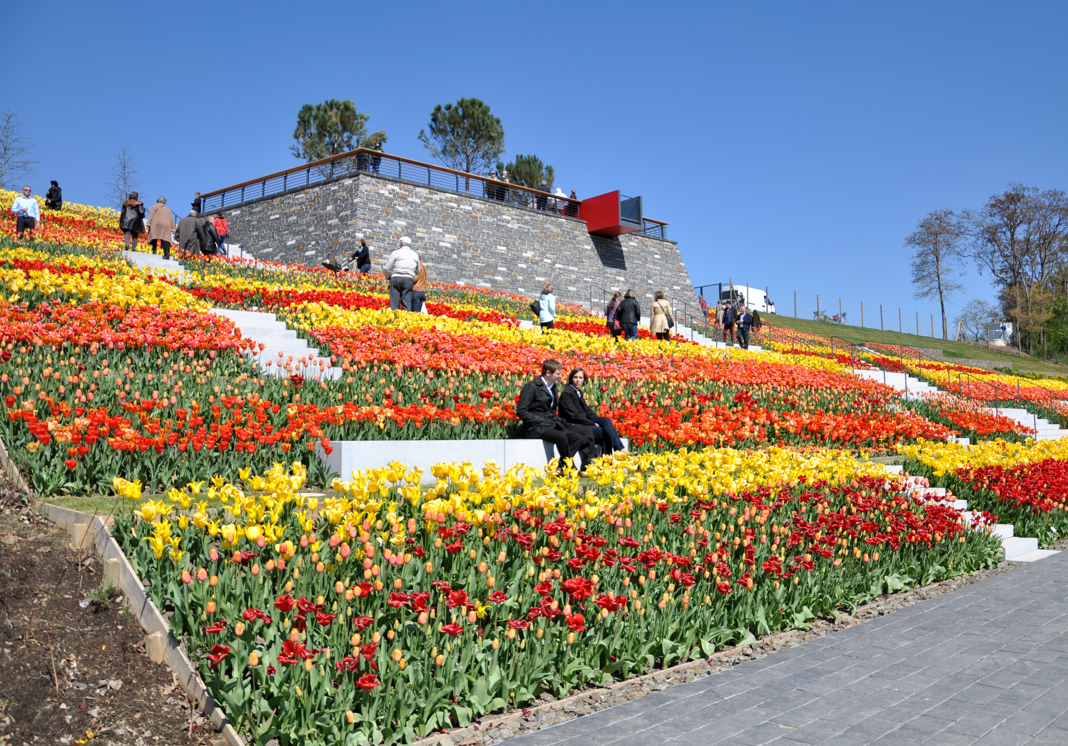 Landesgartenschau Zülpich 2014, Impressionen vom Eröffnungstag 16. April 2014